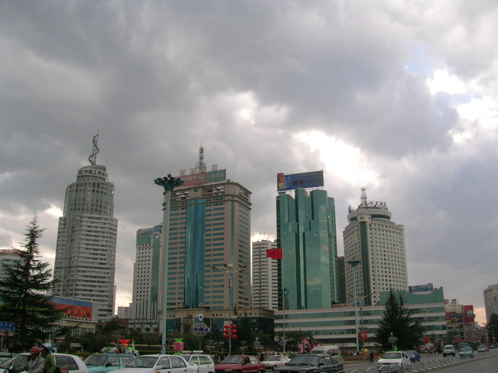 Kunming, Yunnan, China